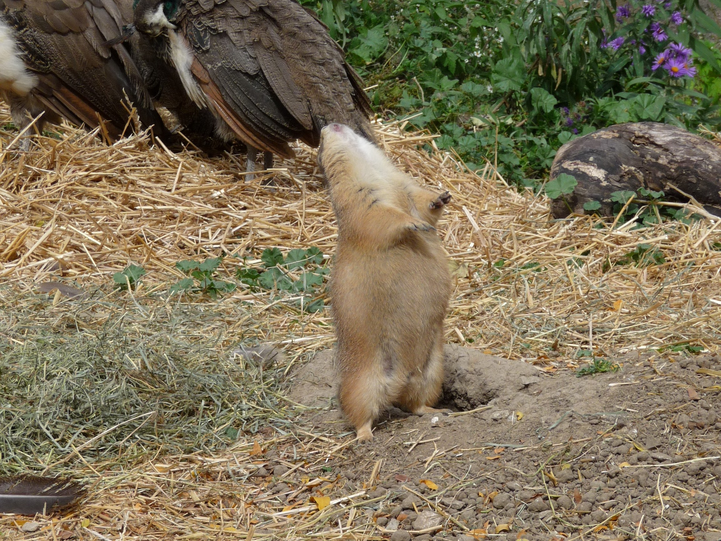 Prairie Dog Jump Yip